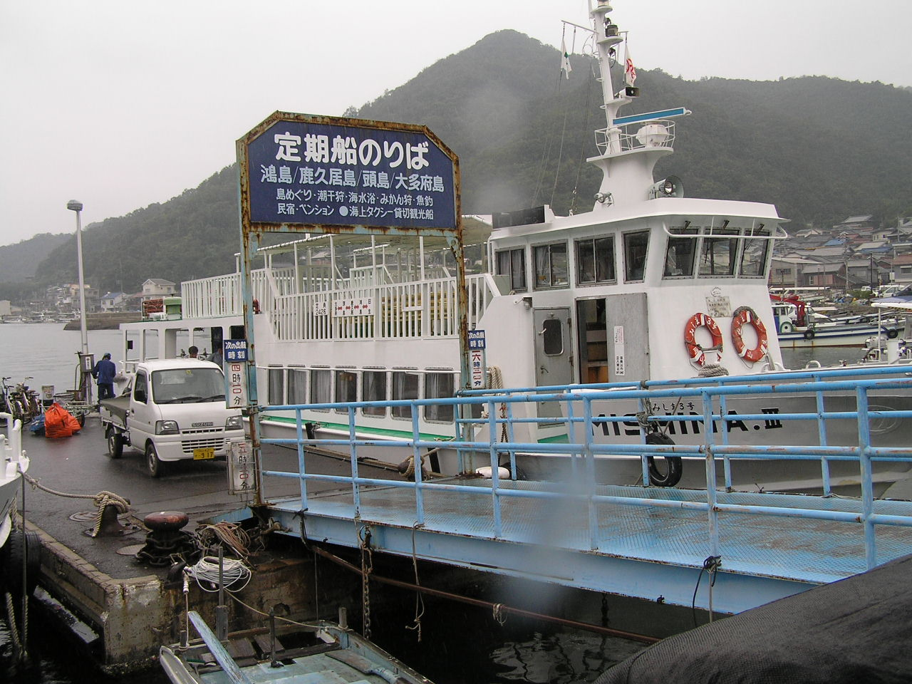 Kashira island in Bizen, Okayama,Japan 岡山県備前市日生町日生,頭島